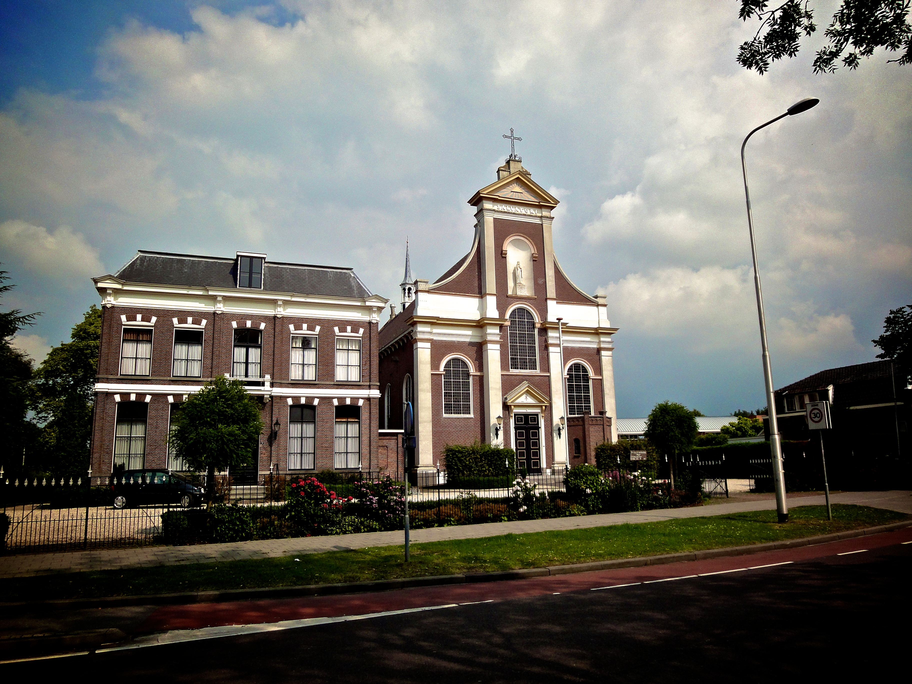 Neoclassicistische eenbeukige kerk (1852-1854, W.J. van Vogelpoel). Saint Barnabas Church in Haastrecht (1854).